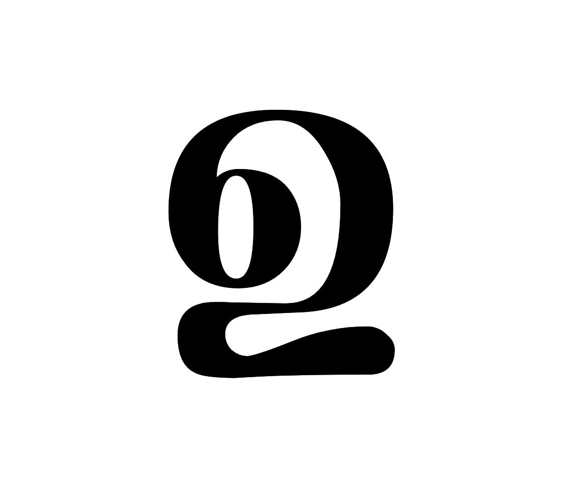 ഉ മലയാളം അക്ഷരം